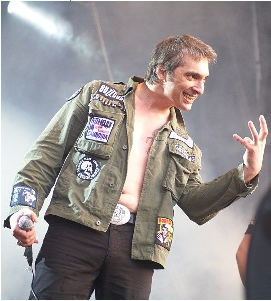 Михаил Горшенёв (Горшок) — солист панк-группы Король и Шут на фестивале Доброфест 2011.